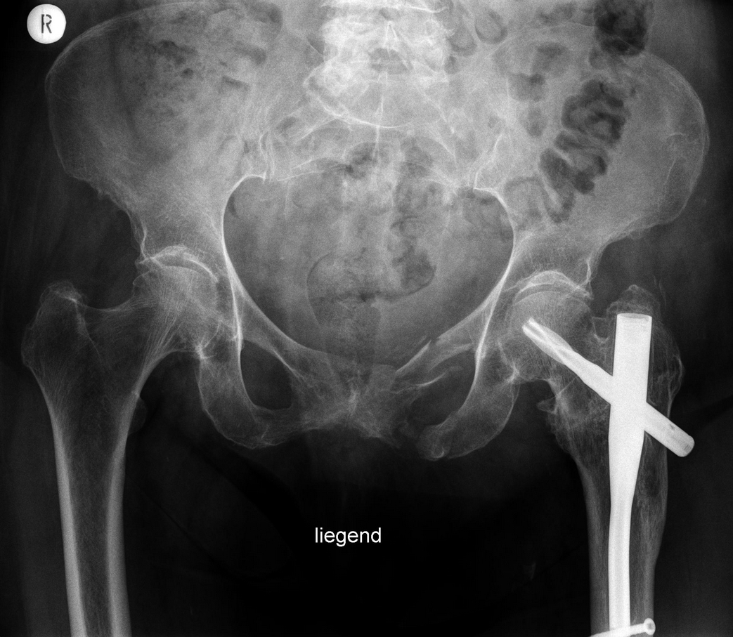 Unbehandelter Schambeinbruch